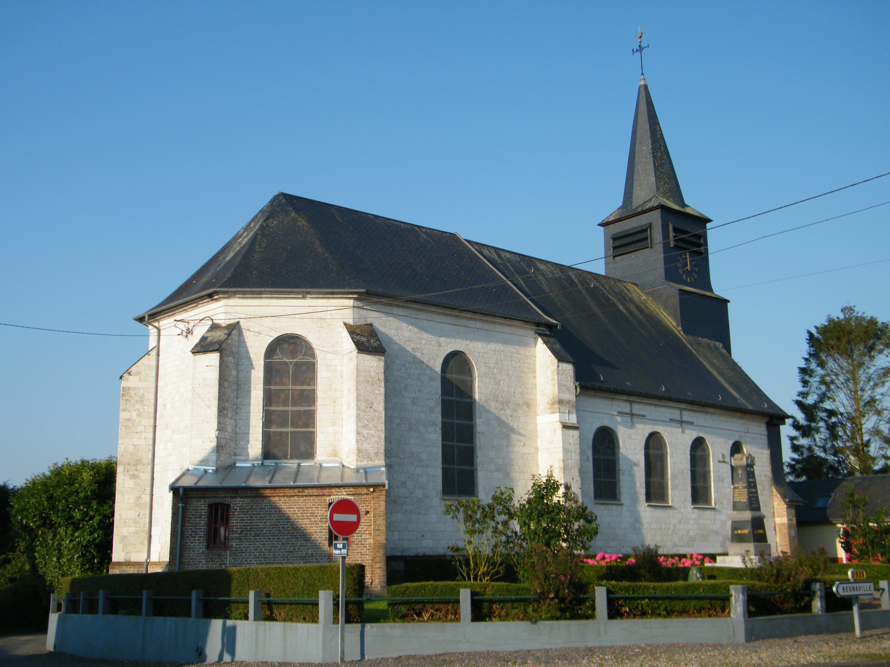 église.